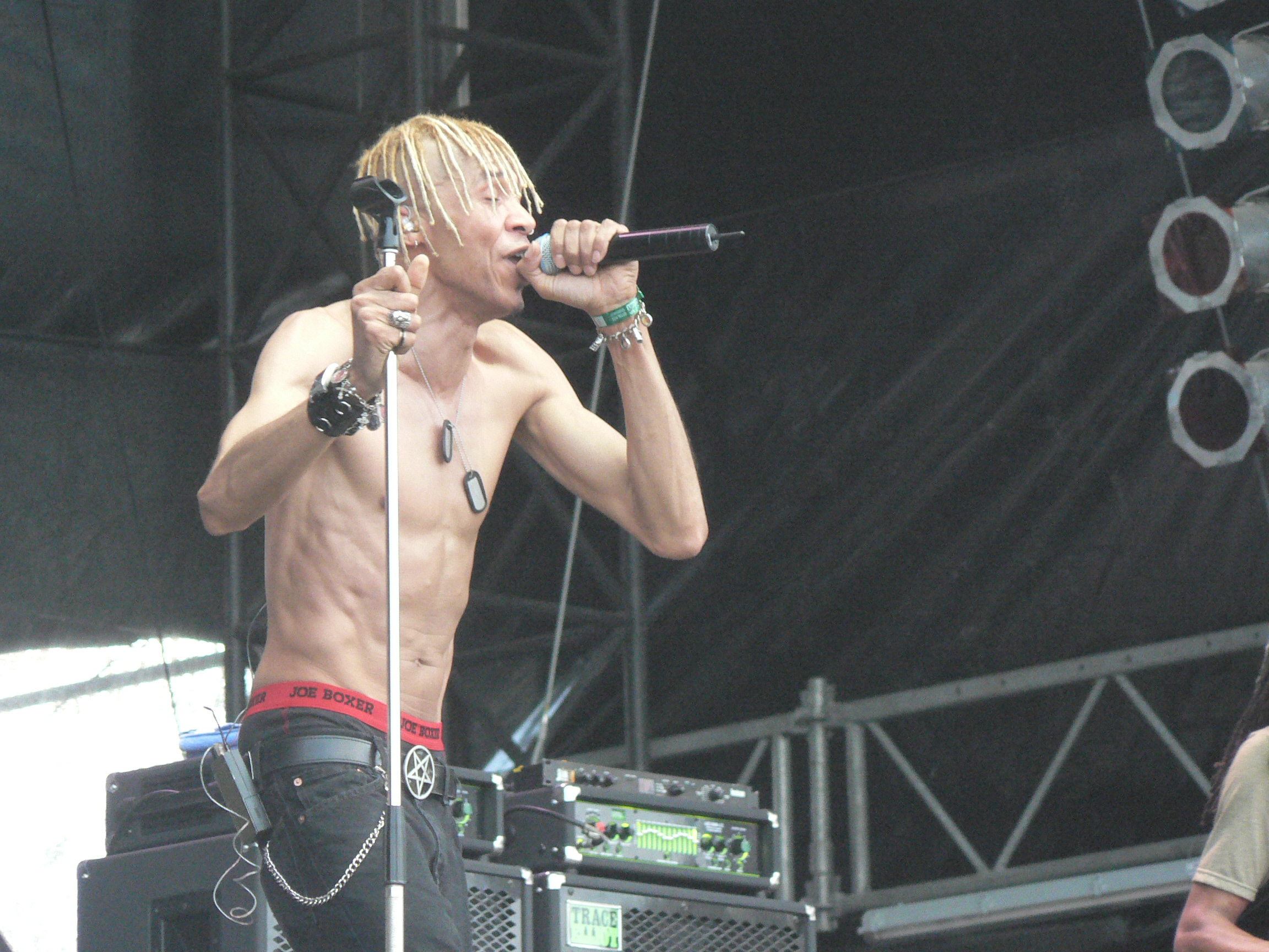 A felvétel 2006. augusztus 15-én készült Budapesten. Sziget Fesztivál, Living Colour koncert a Nagyszínpadon. ©© Derzsi Elekes Andor, Budapest, 2014, A kép egészben, vagy részletekben másolását, bármilyen úton történő sokszorosítását és felhasználását a szerző ellenérték nélkül, jogutódjaira is kihatóan megengedi. Az engedély kiterjed a kereskedelmi célú hasznosításra is. Kéri azonban nevének feltüntetését a felhasználás során. A Metapolisz sorozat valamennyi képe és filmje Creative Commons alatti valamint kereskedelmi - for profit - célra is felhasználható. Ajánlott hivatkozás: Derzsi Elekes Andor: Metapolisz DVD line